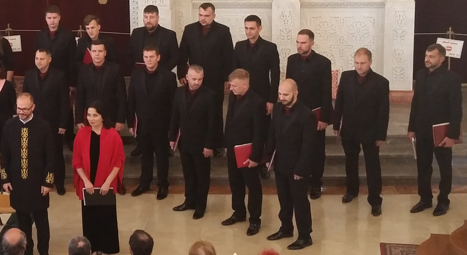 אנסמבל קולות הנשים נעמה מישראל ומקהלת הגברים הרוסית סימוול וורי בקונצרט משותף בכנסייה היוונית אורתודוקסית ברחוב הפרסים 3 בחיפה. הופעה בתוכנית זהה להופעה בפסטיבל אבו גוש שבה הופיעו ב-14 באוקטובר 2017